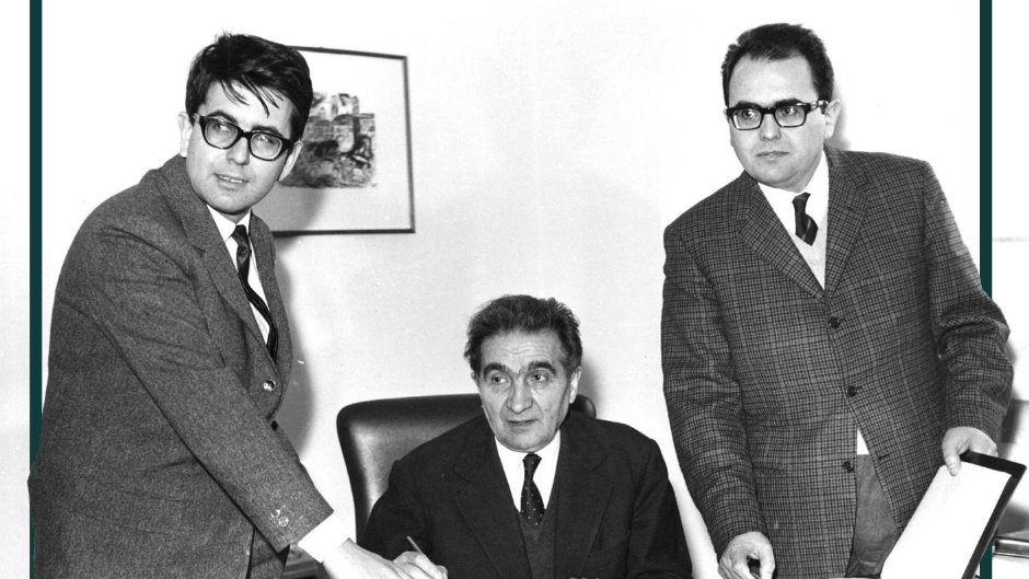 Aristide Merloni nella sede della Ariston, con i figli Francesco e Vittorio